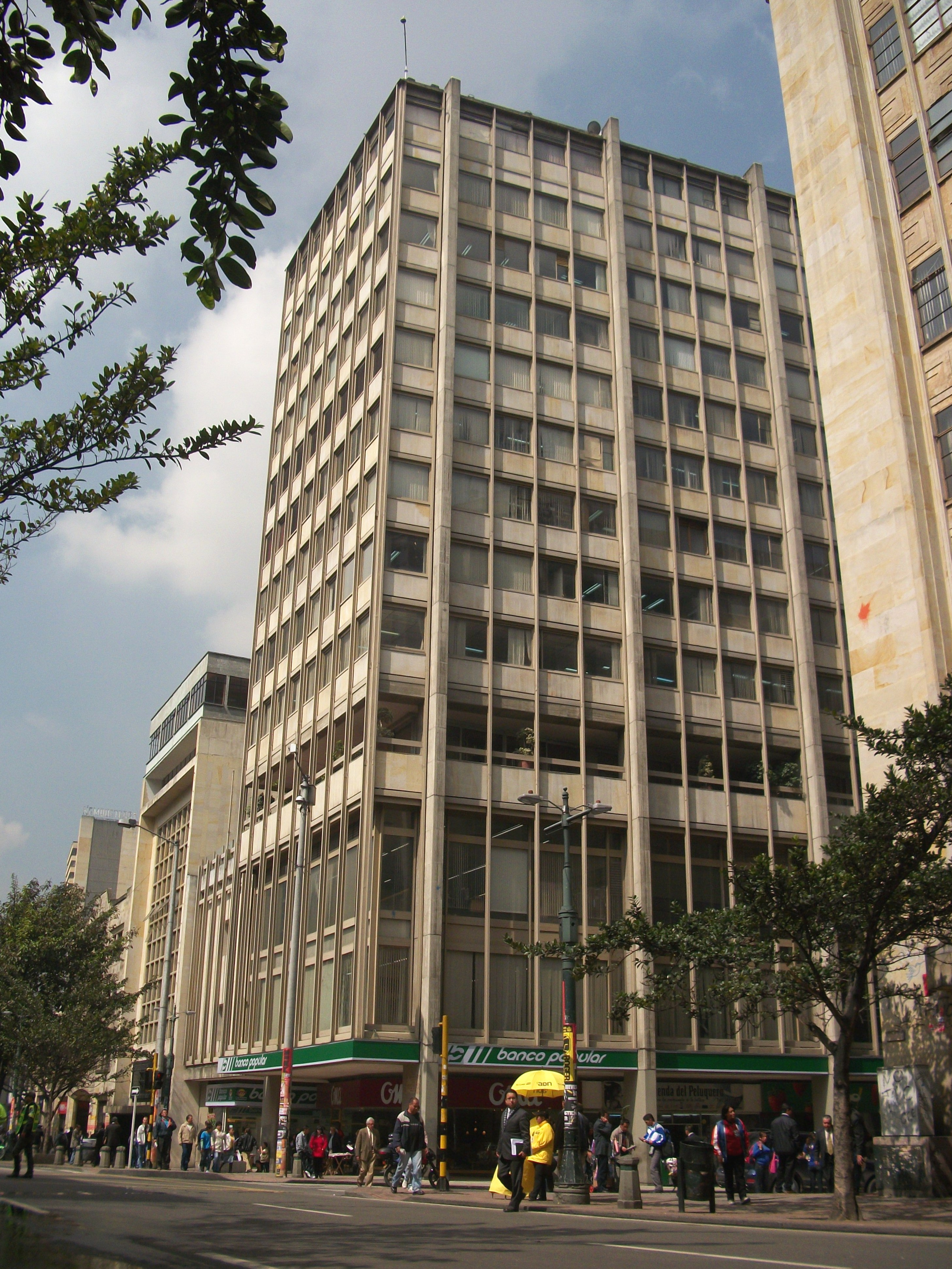 Edificio cra 7 con calle 17 Bogotá, barrio Veracruz.